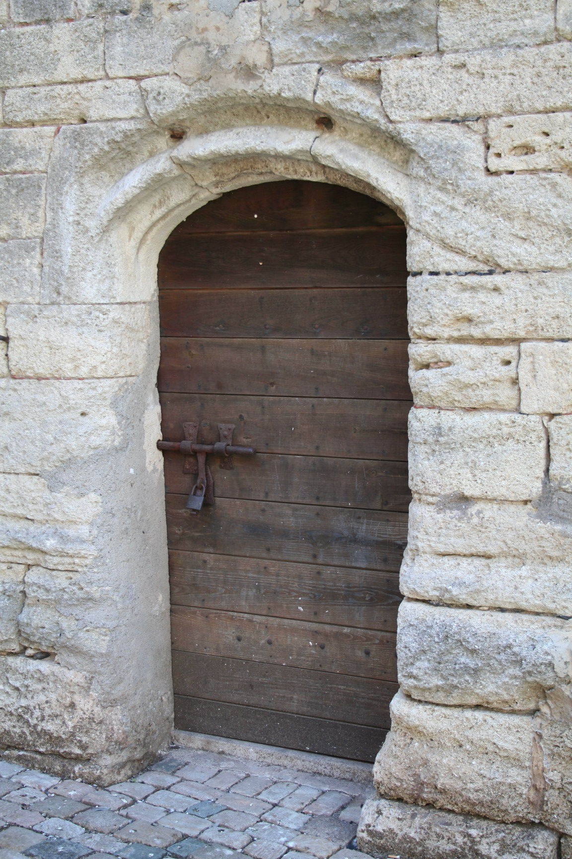 Saint-Thibéry (Hérault, France) - Porte de la Tour de l'abbaye, avec son célèbre verrou : "Qui embrasse ce verrou, se marie dans l'année".